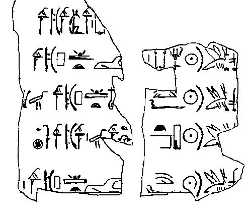 Turin Canon Ausschnitt vom Ende Gardiners VI. Spalte (13. Dyn.)